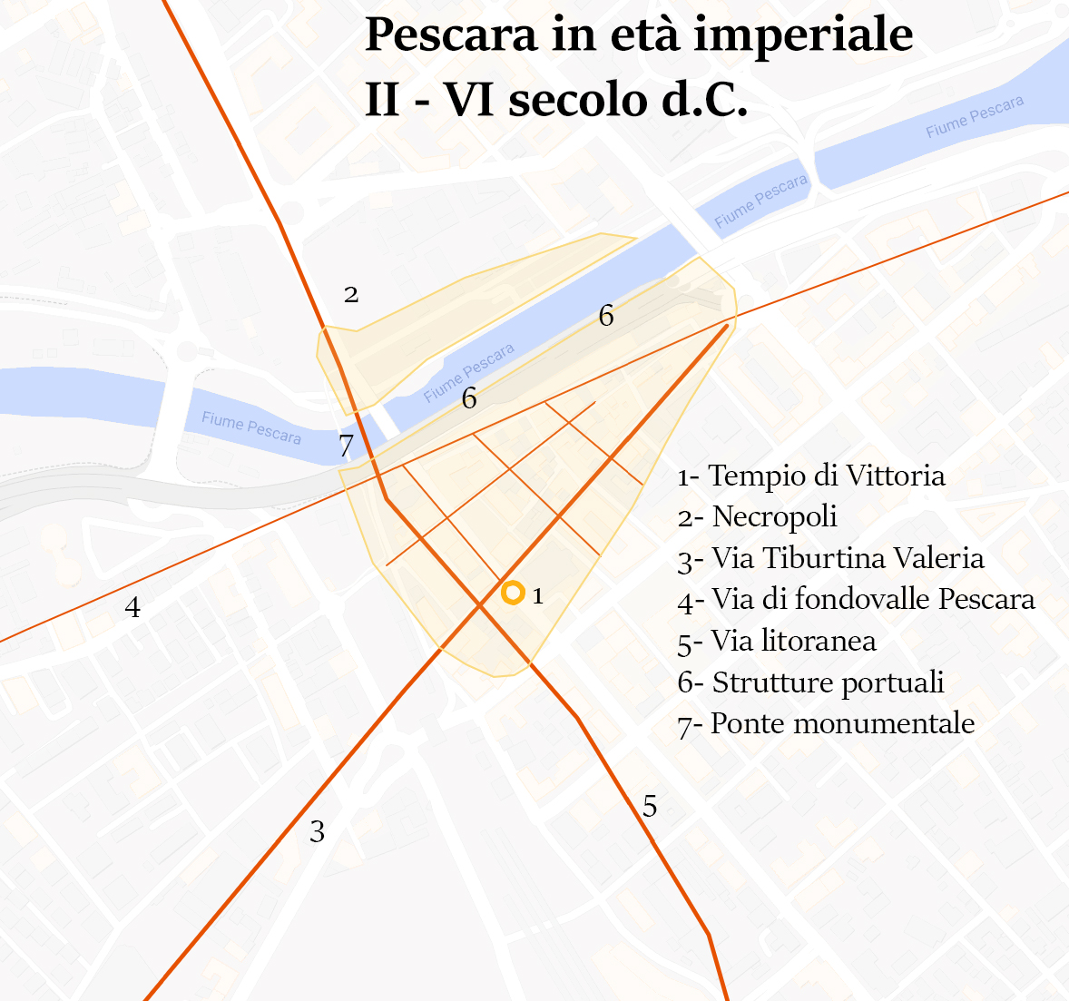 Ricostruzione dell'estensione dell'abitato di Ostia Aterni